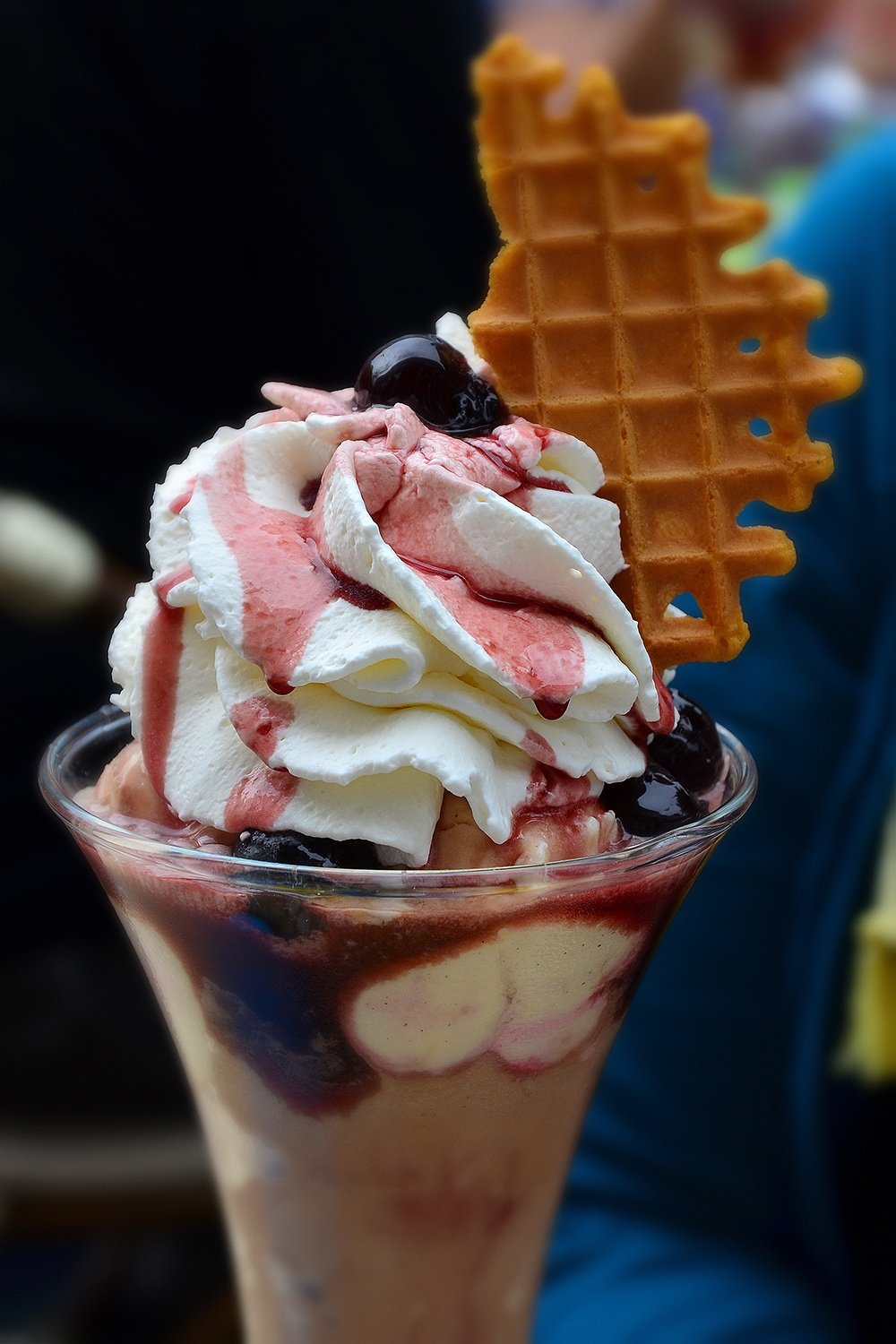 Eiscafe Sommariva, Hamm, Datum/Uhrzeit: 07.06.2012 17:52:34